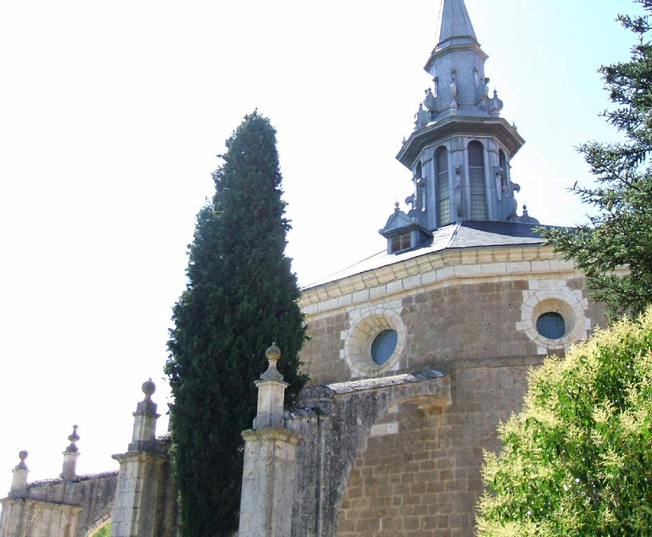 Shrine of San Pedro Regalado, La Aguilera (Burgos)